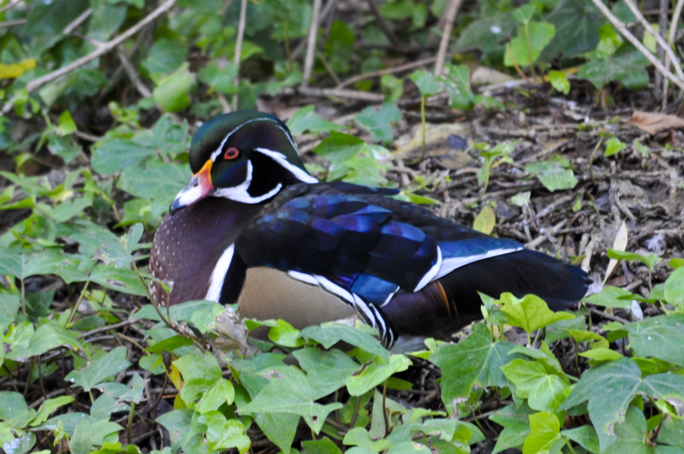 Aix sponsa, zoo Jerez